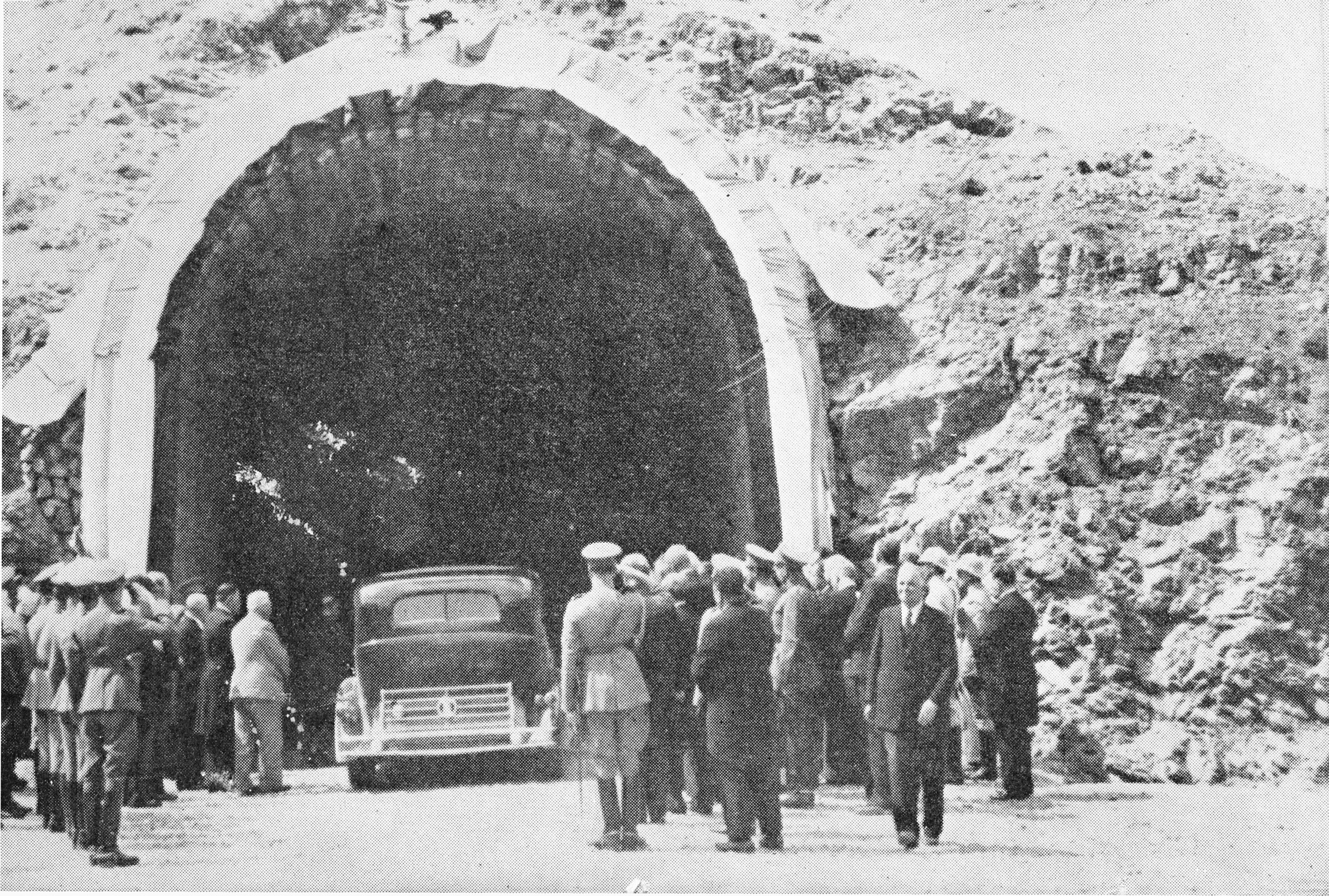 افتتاح تونل کندوان 1317